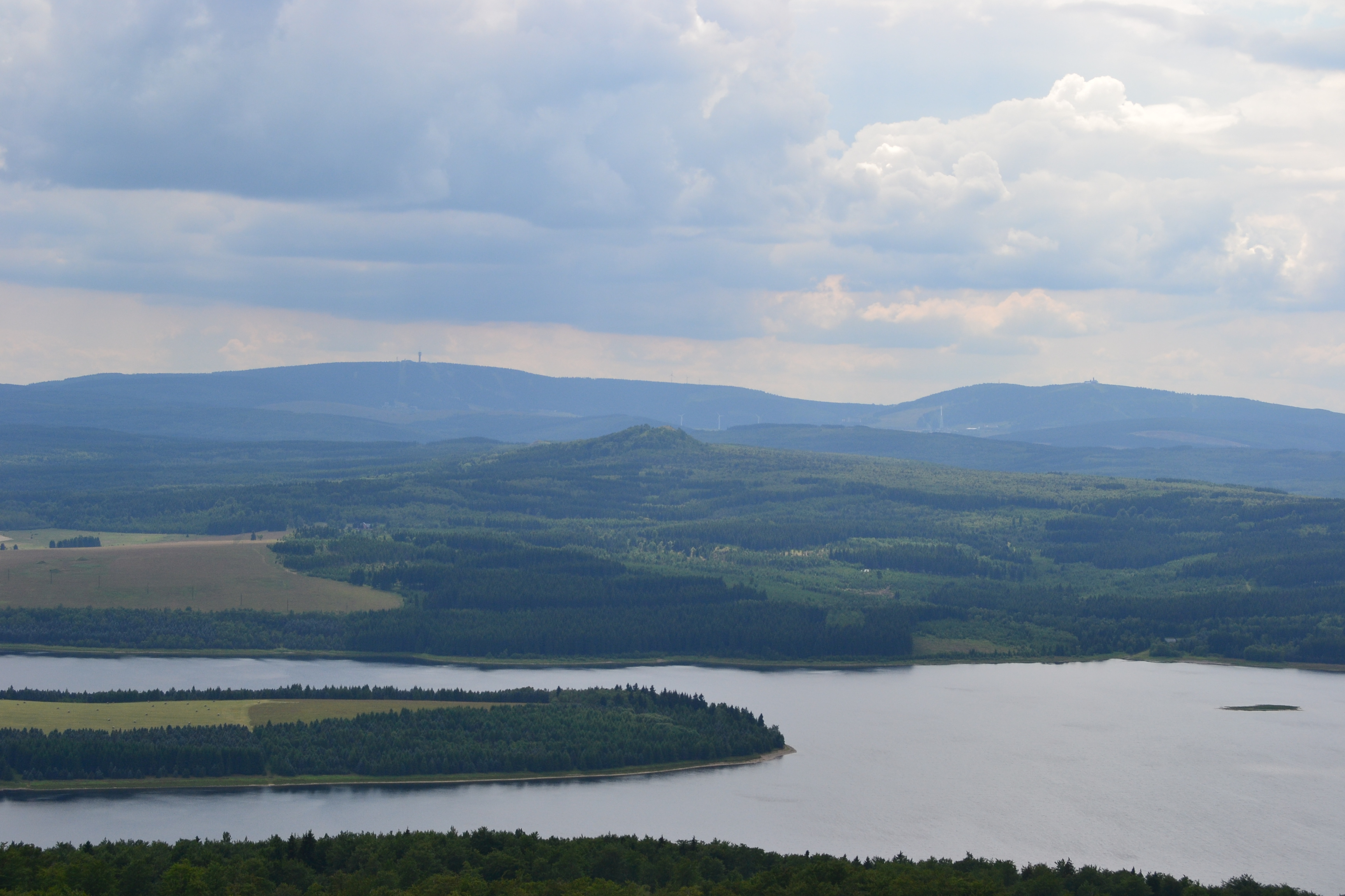 Blick vom Jelení hora nach Südwest. Im Hintergrund das Fichtelberg-Keilberg-Massiv, in Bildmitte der Velký Špičák und im Vordergrund ist ein Teil des Stausees der Talsperre Preßnitz erkennbar.